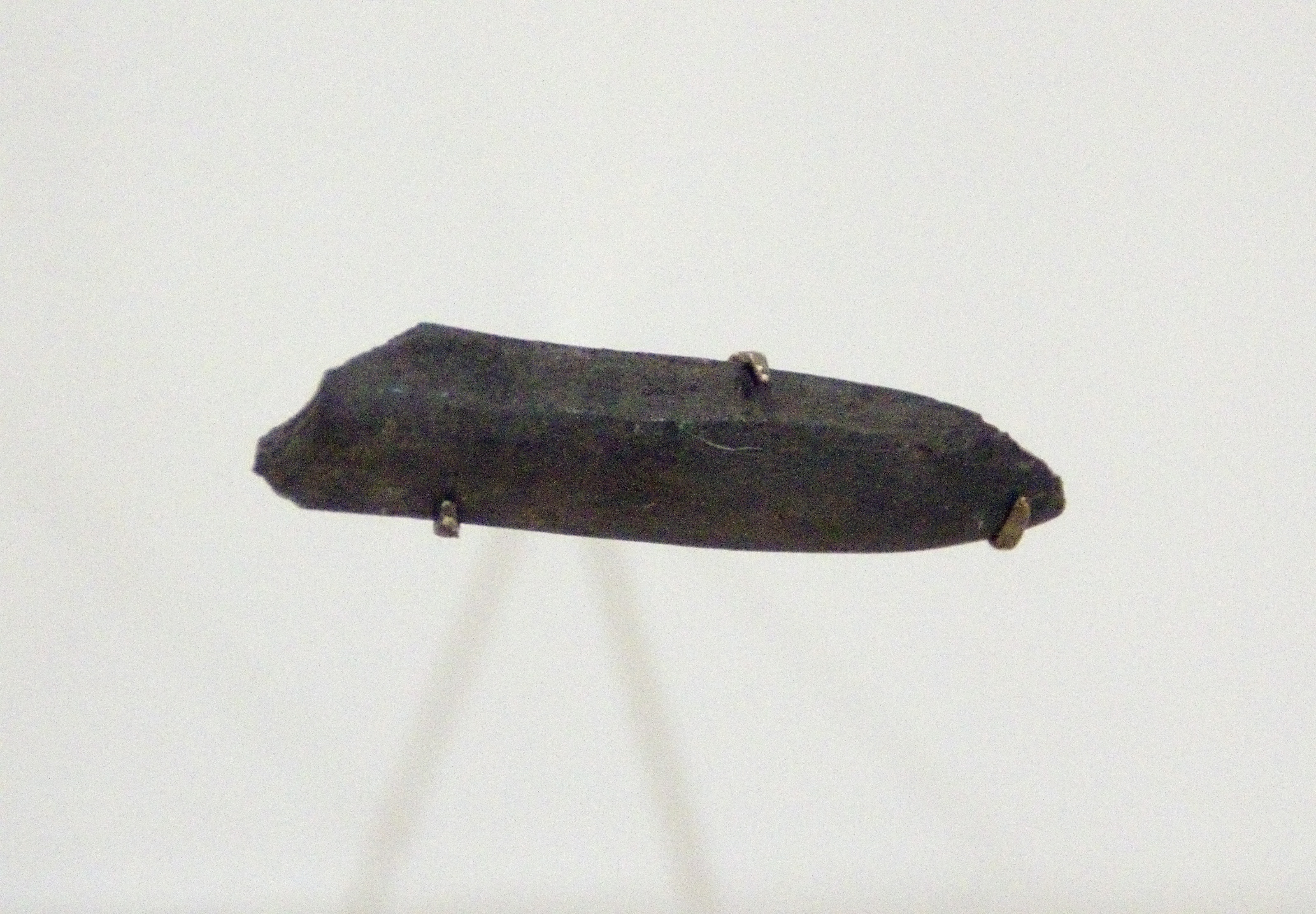 Pointe d'ardoise retrouvé lors des fouilles au site de la Maison Nivard-De Saint-Dizier à Verdun (Montreal).